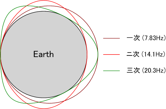 ??:Neotesla